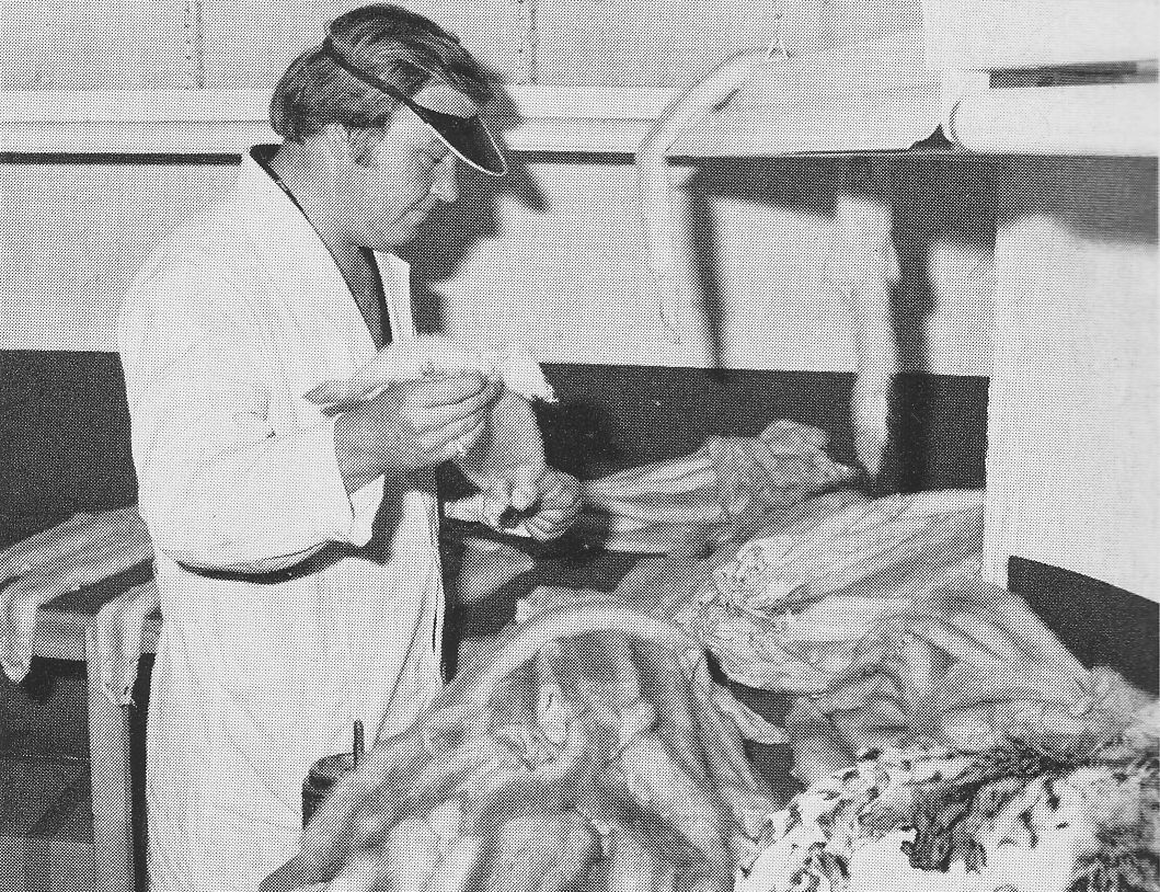 Rauchwarenhändler Henry Beck (Felle und Konfektion), Spezialist für sogenannte gefleckte Ware, Frankfurt am Main, Niddastraße 57, im neugestalteten Ladengeschäft, April 1973. Harry Beck am Sortiertisch.